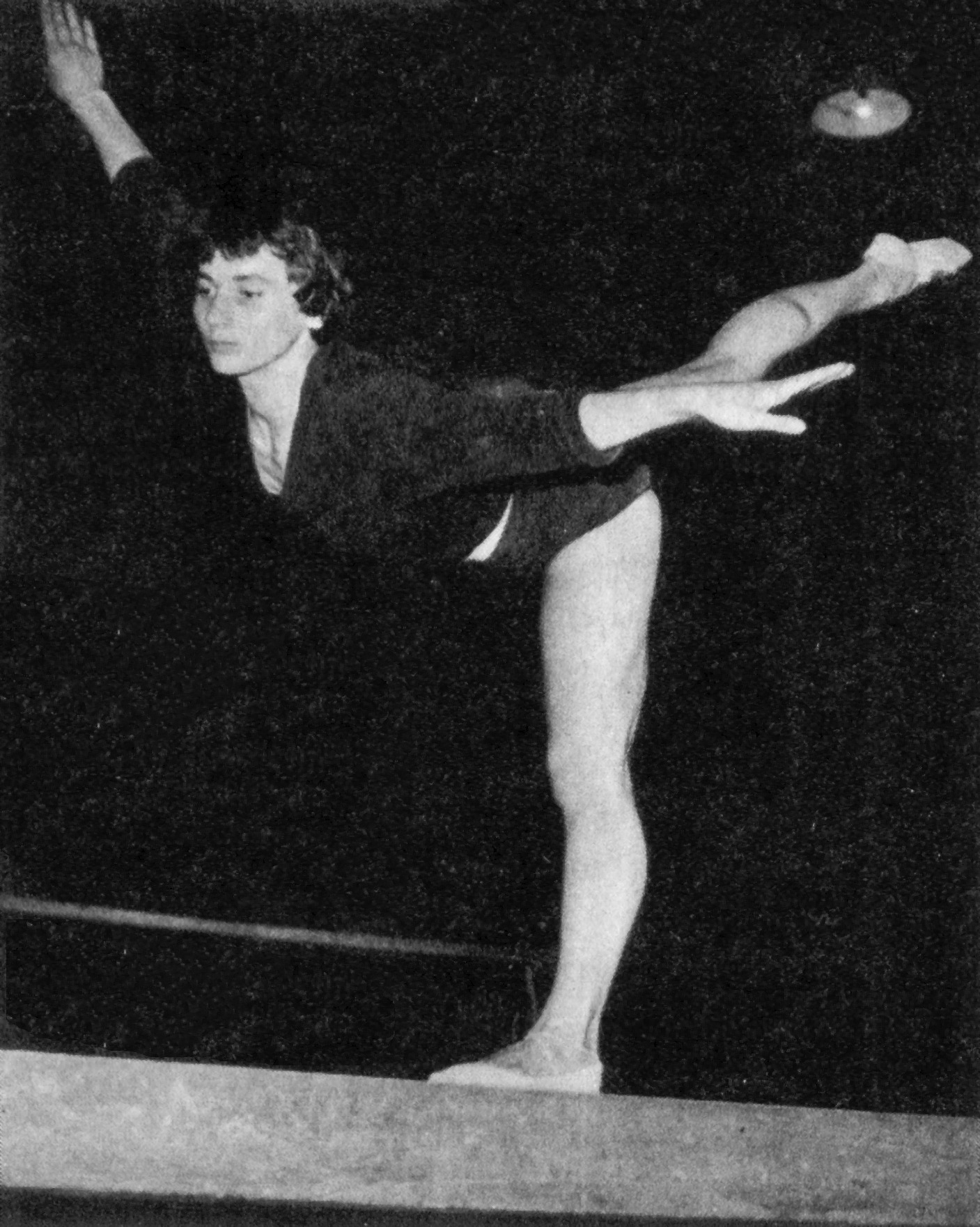 Elena Leușteanu